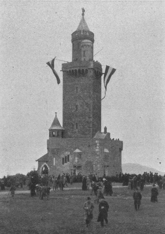 Der am 12. Oktober 1902 eröffnete Aussichtsturm auf dem Großen Feldberg im Taunus.